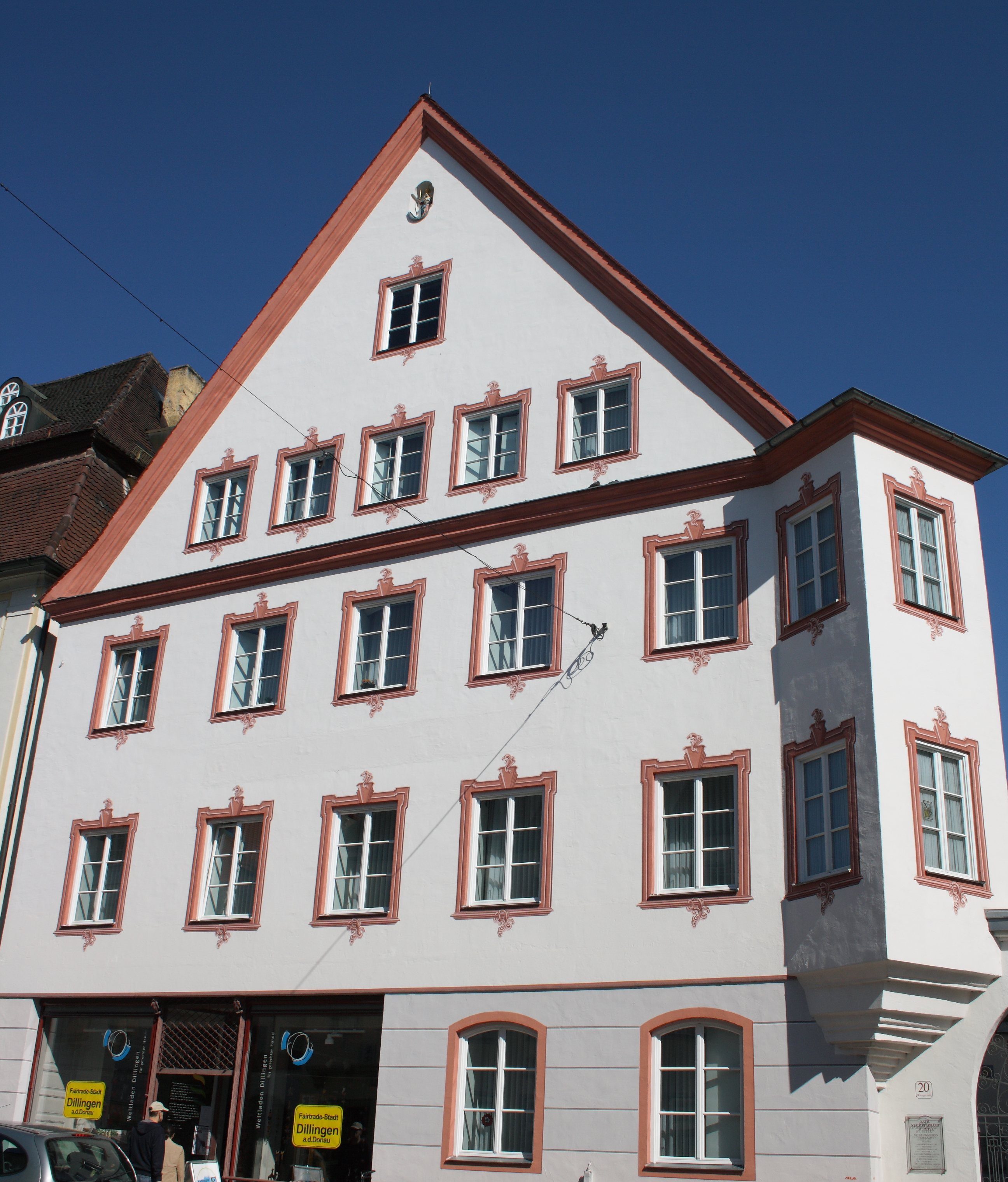 Bürgerhaus, Königstraße 20, in Dillingen an der Donau (Bayern), 17. Jh.